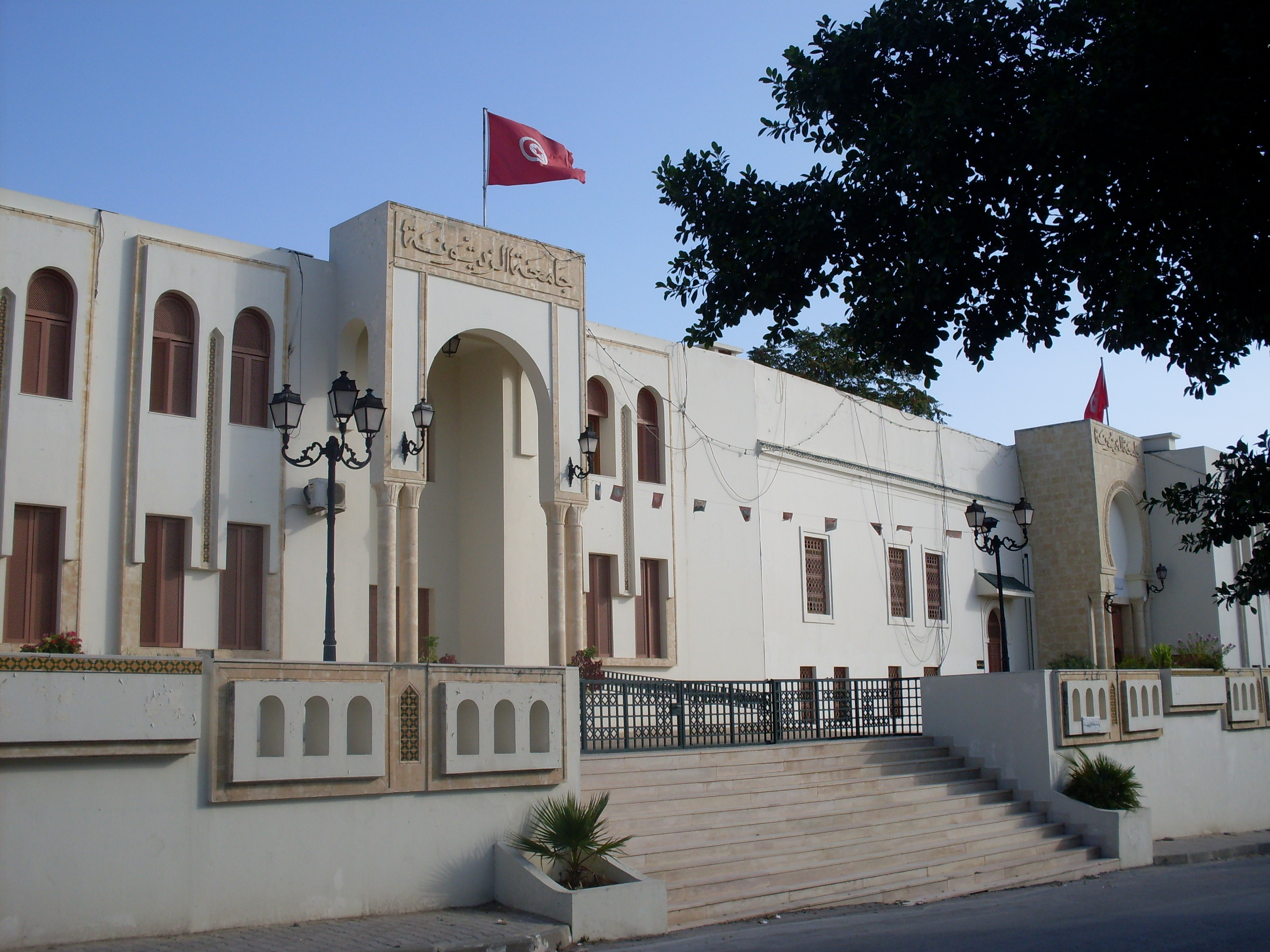 Faculté Ezzaitouna Tunis